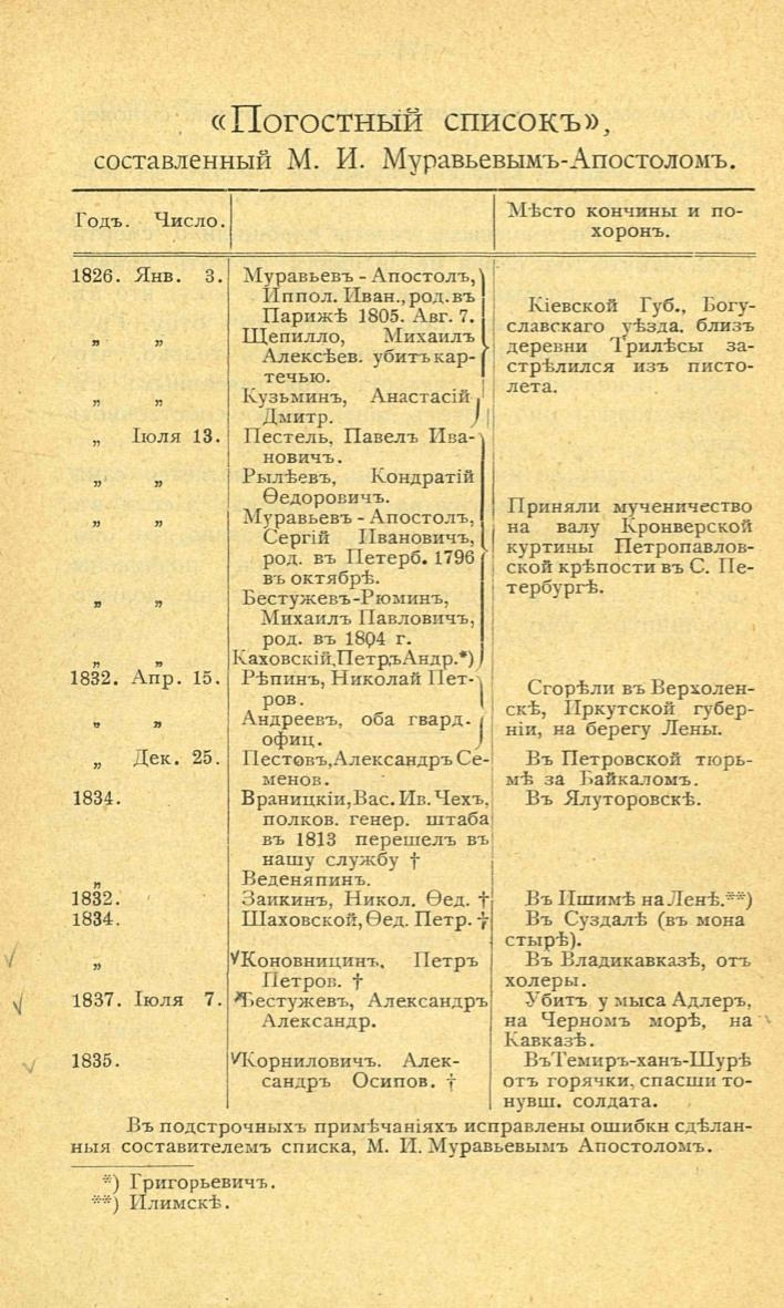 Скан первой страницы погостного списка декабристов, составленного М.И. Муравьевым-Апостолом (умер в 1886 г.) и опубликованный в кн.:Декабристы. Материалы для характеристики - М.: Изд. М.М. Зензинова, 1907, 176 с.